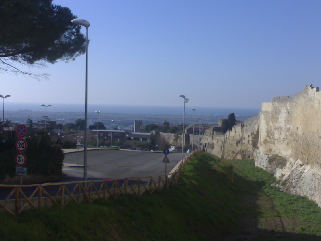 scattata da me